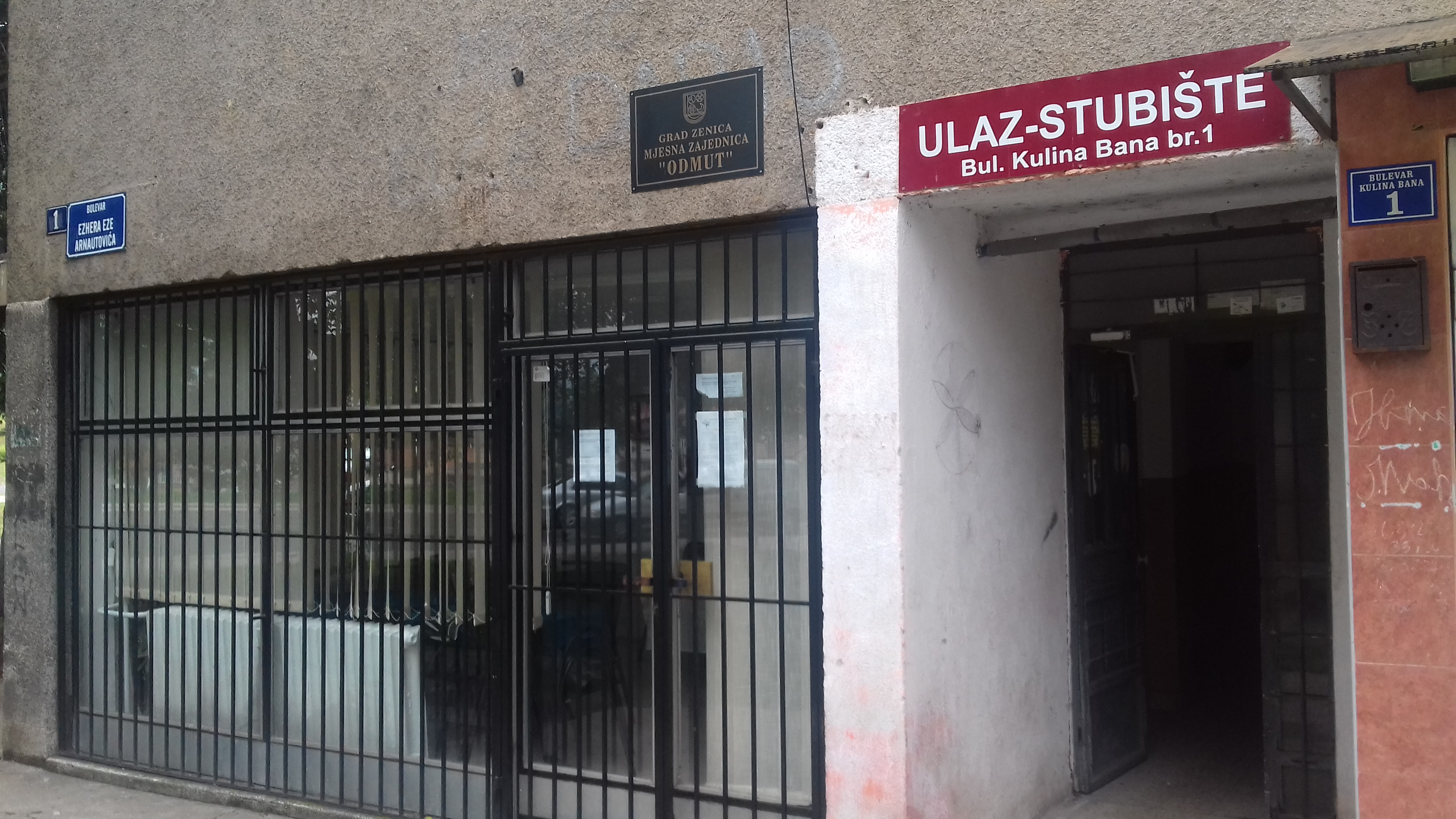 Одмут, двије табле улице: једна са старим називом булевара који Зеничани не дају да се промијени и друга са новоусвојеним називом по бившем градоначелнику који је започео изградњу булевара